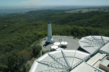 Вид с горы Лофти на север